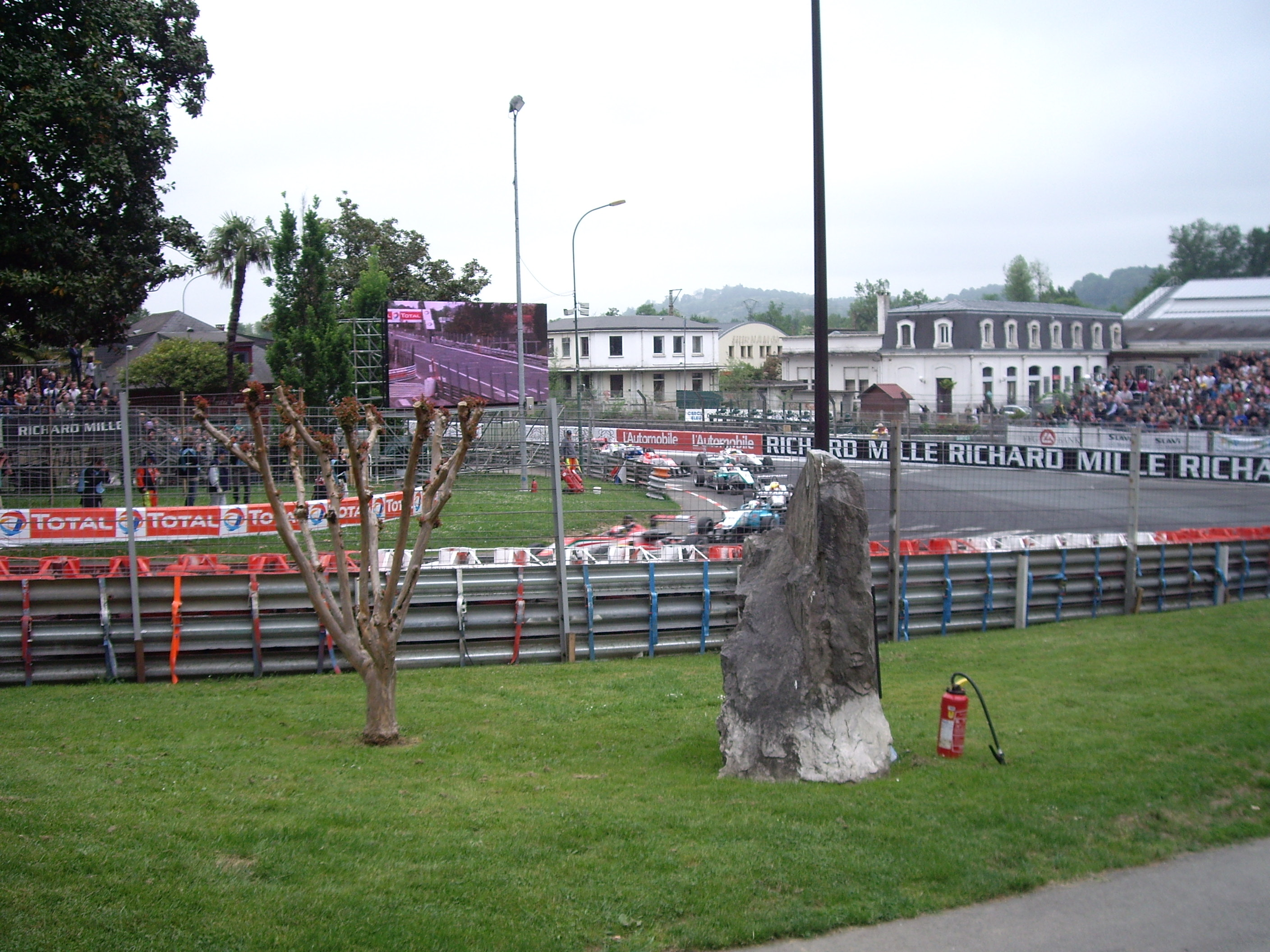 Départ de la course 1 de Formule 3 a Pau en 2012